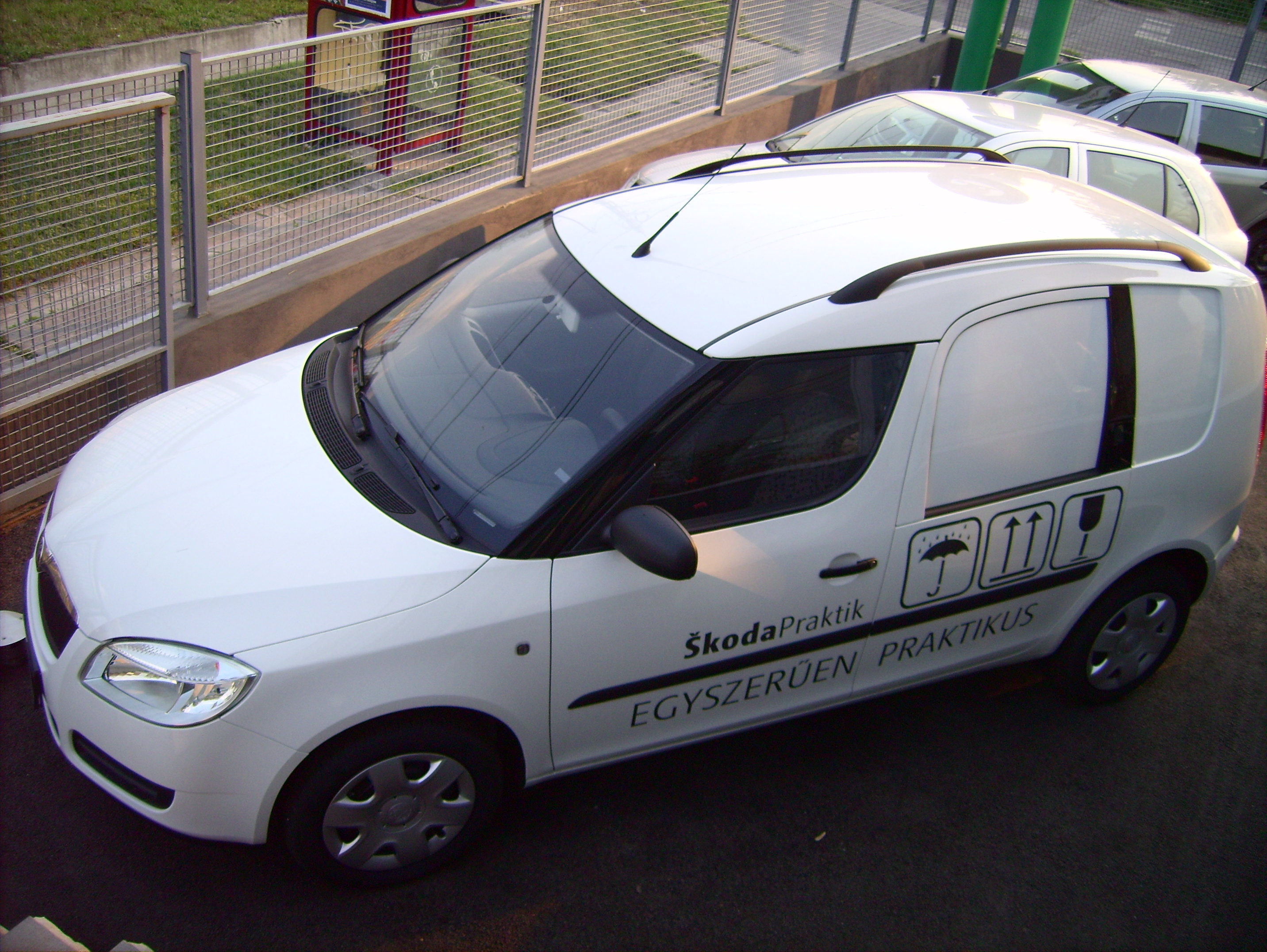 Škoda Praktik for sale at a Škoda dealer in Budapest